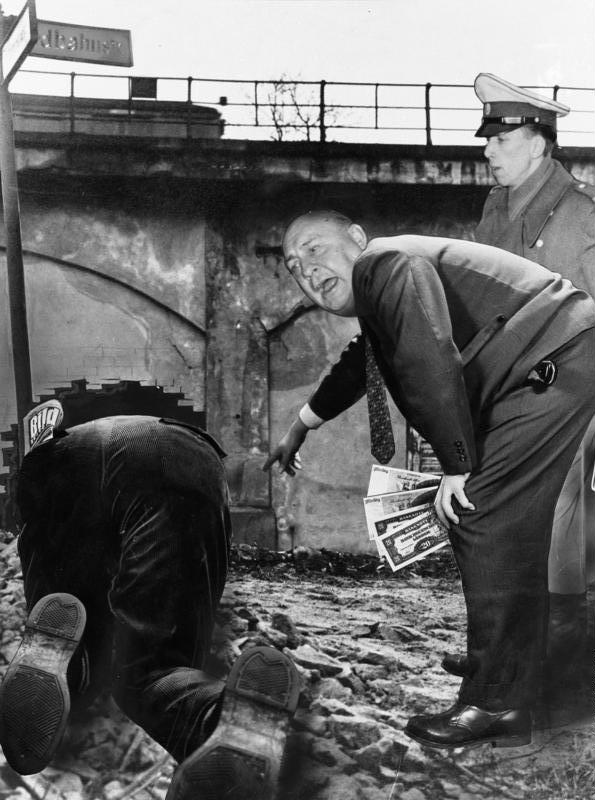 Berlin, Ernst Lemmer, Fotomontage Zentralbild / Montage-Schulz 9.2.1962 Der Schutzpatron der Westberliner Spionageorganisation [Ernst] Lemmer Eine Fotomontage zur Agentenschleuse am Berliner S-Bahnhof Wollankstraße [Berlin.- Propagandistische Fotomontage mit einem auf allen Vieren kriechenden Mann mit Bild-Zeitung in der Hosentasche, dem Kopf von Ernst Lemmer und bundesdeutschem Geld in der Hand, sowie einem Berliner Polizisten vor einem aufgemalten Tunnel / Durchbruc] Abgebildete Personen: Lemmer, Ernst: Bundesminister für gesamtdeutsche Fragen, CDU, Journalist, Bundesrepublik Deutschland